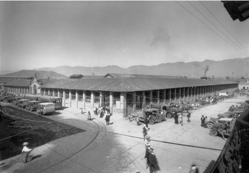 exterior de la Plaza de Mercado (cubierta), fotógrafo Francisco Mejia Medellín, Colombia.